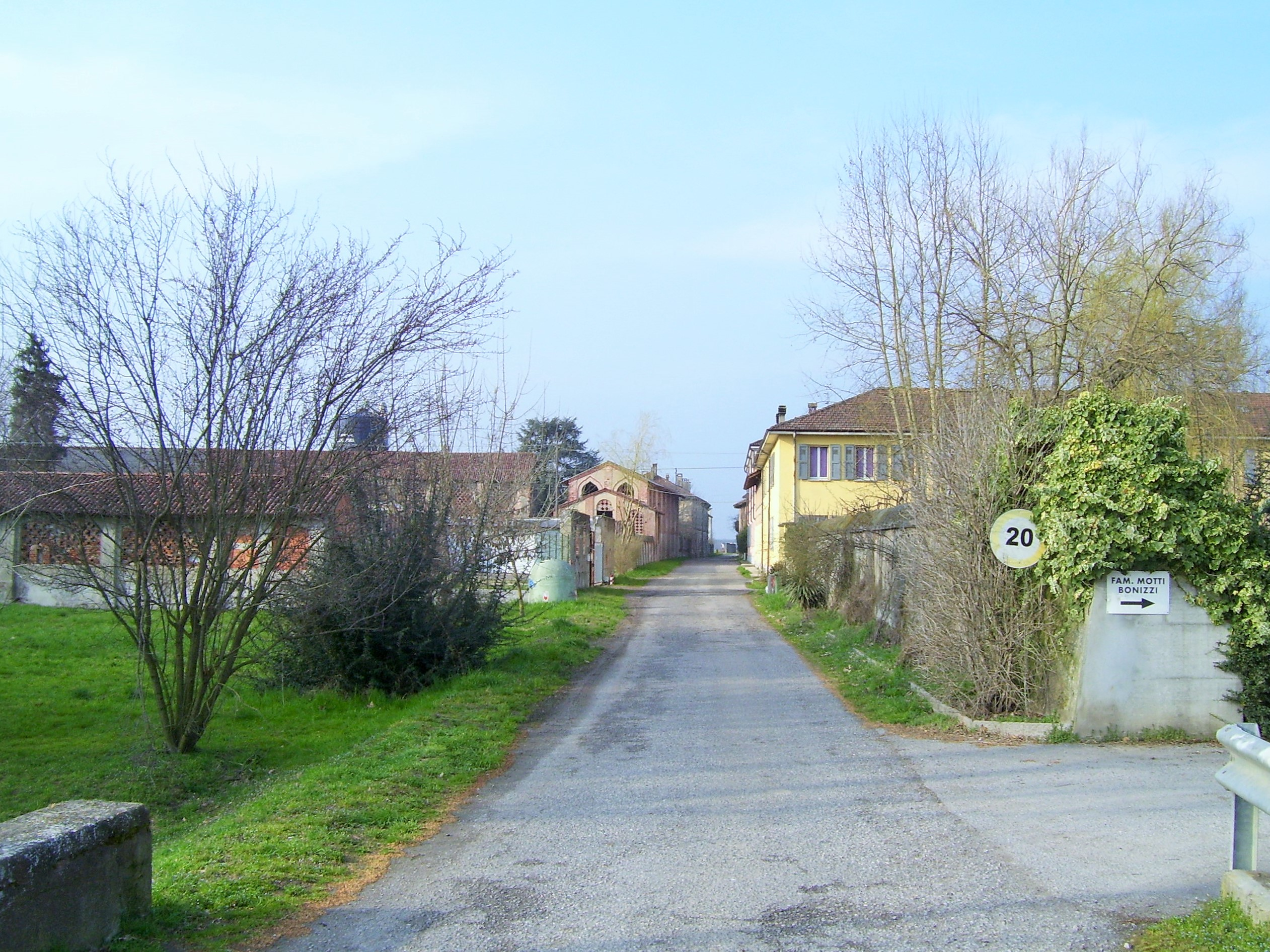 Brembio. Monasterolo. Veduta dal ponte del Brembiolo.